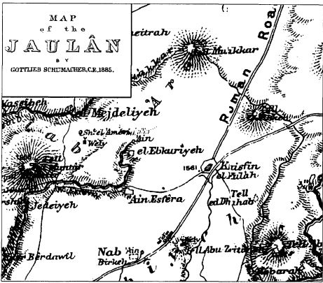 חיספין (חספיה) במפה של גוטליב שומאכר אותה צייר בסקר הגולן שערך ב-1885, הדרך לחורן עוברת ליד הכפר. ממערב לחיספין היישוב עין אספיירה בו נמצא היישוב חיספין שחדש